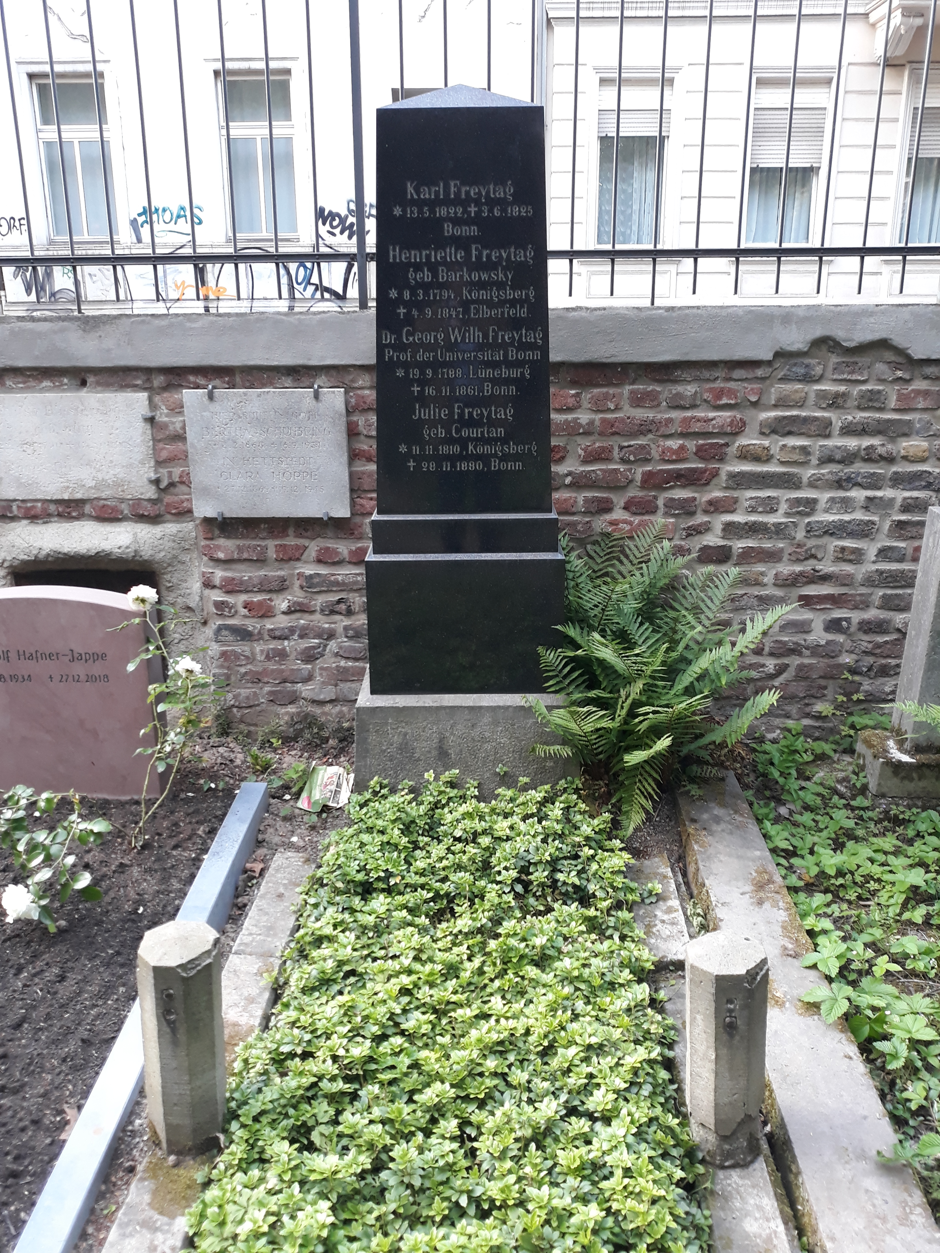 Das Grab des deutschen Orientalisten Georg Wilhelm Freytag im Familiengrab auf dem Alten Friedhof Bonn.